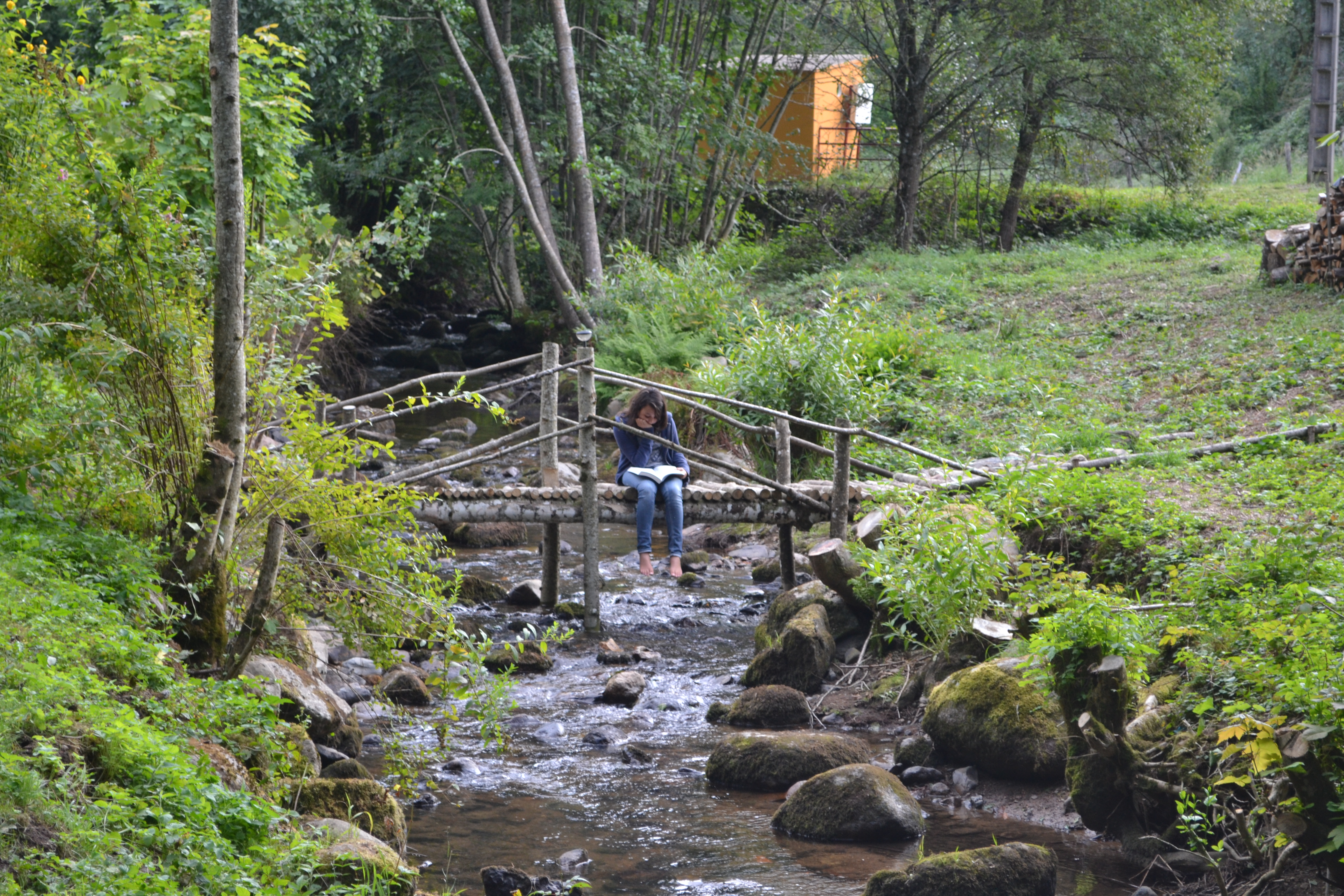 Petit pont de bois sur le Raddon à Fresse (70270, Parc Naturel Régional des Ballons des Vosges)